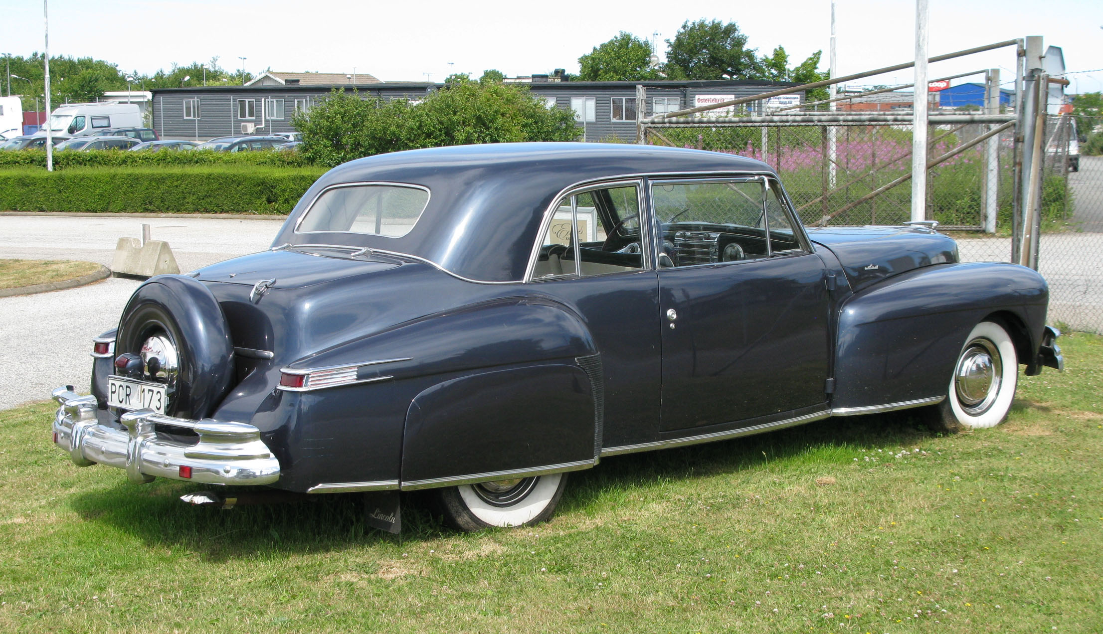 1948 Lincoln Continental